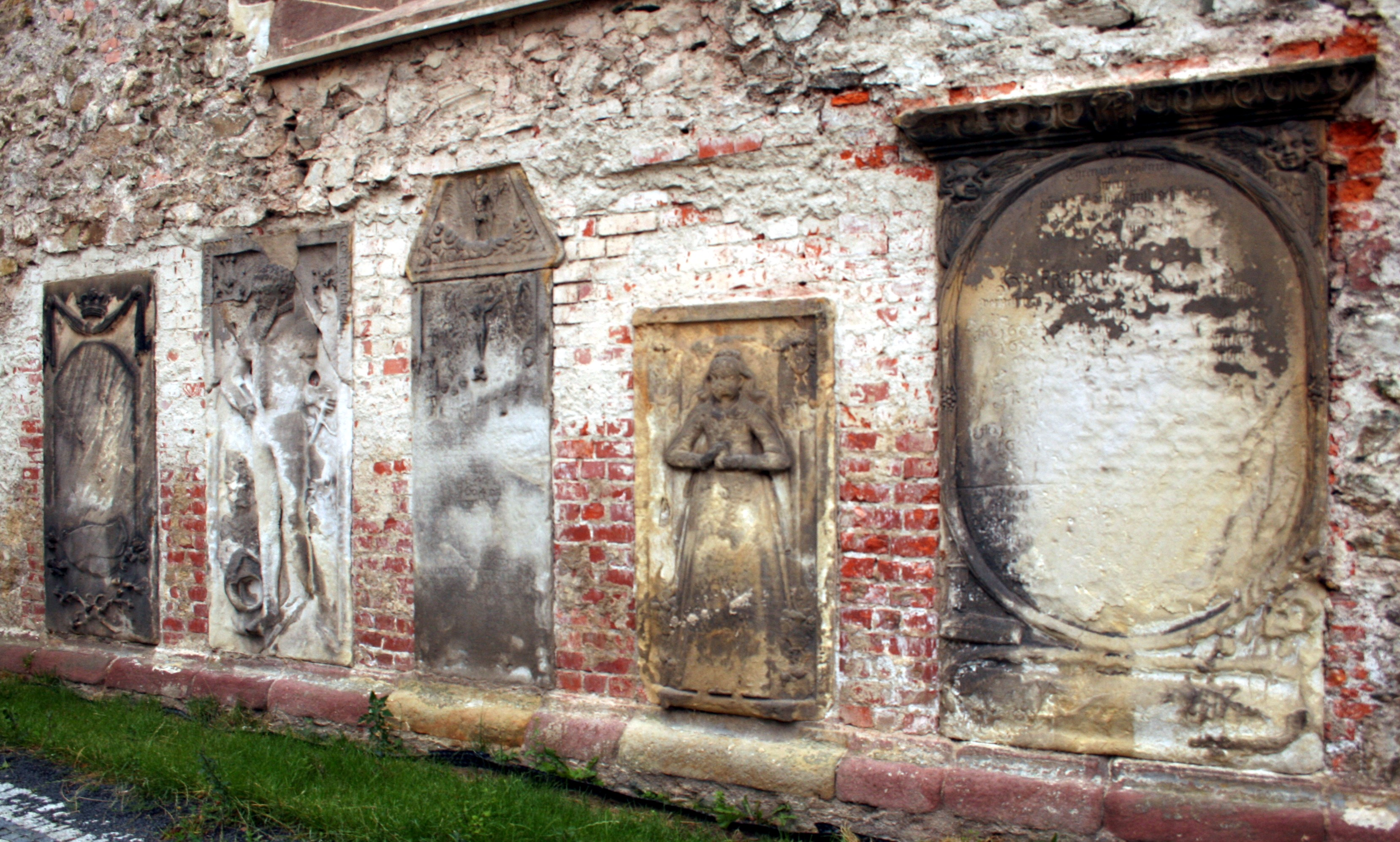 płyty nagrobkowe przy kościele św. Jadwigi w Bolkowie